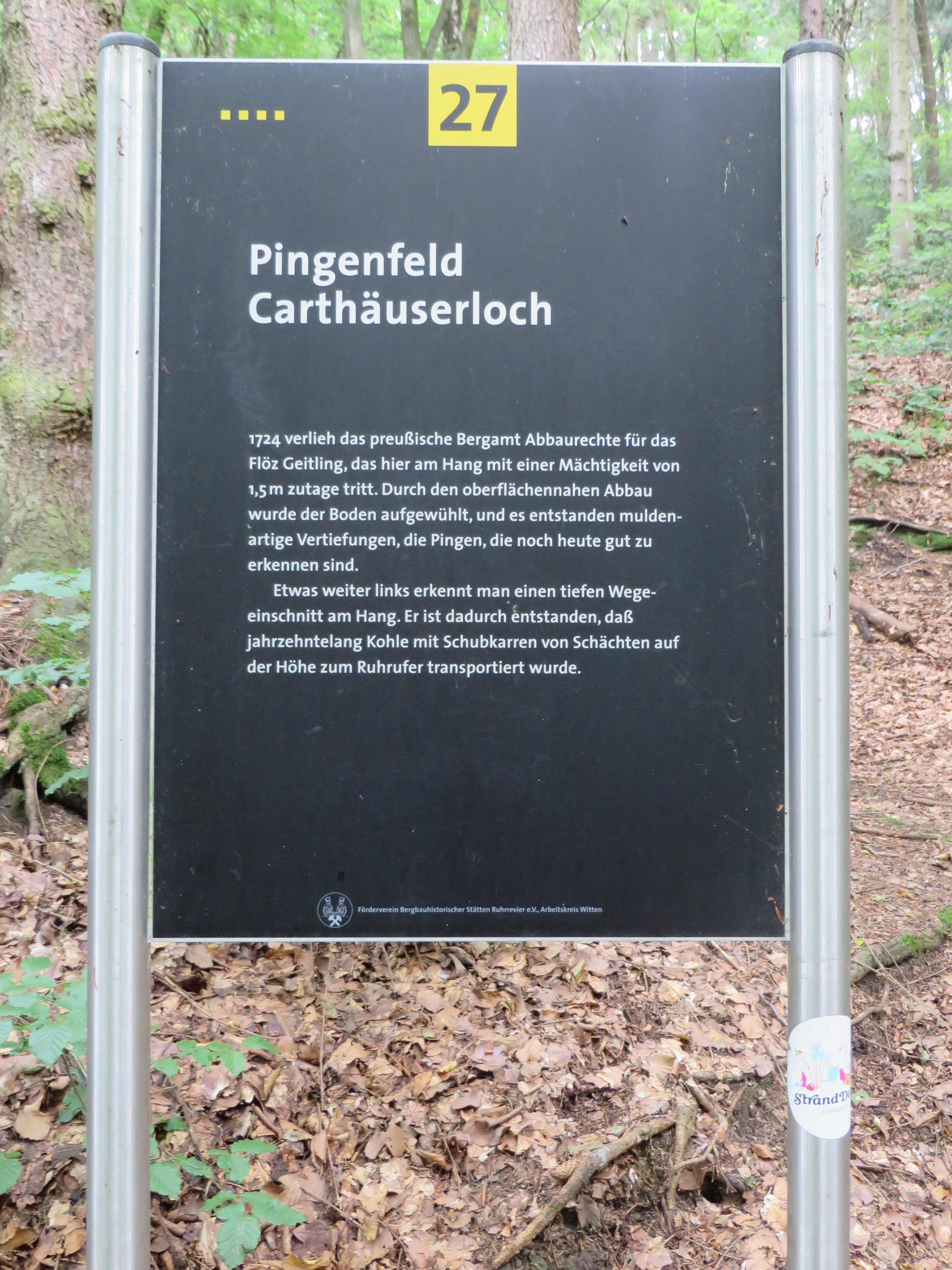 Infotafel Pingenfeld Cartäuserloch auf dem Bergbauwanderweg Muttental